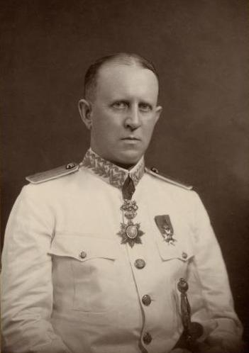 Adelborg, Fredrik Hjalmar F. 1886. D. 1948. Reservunderlöjtnant. I engelsk kofferditjänst 1904-06. Direktör för gummibolag å Malacka 1910-34. Sveriges generalkonsul i Singapore 1928-34. Avdelningschef vid Utrikesdepartementets kuriravdelning 1940-48. Kammarherre. Forskningsresande och donator. Skriftställare. Kungl. Flottan.